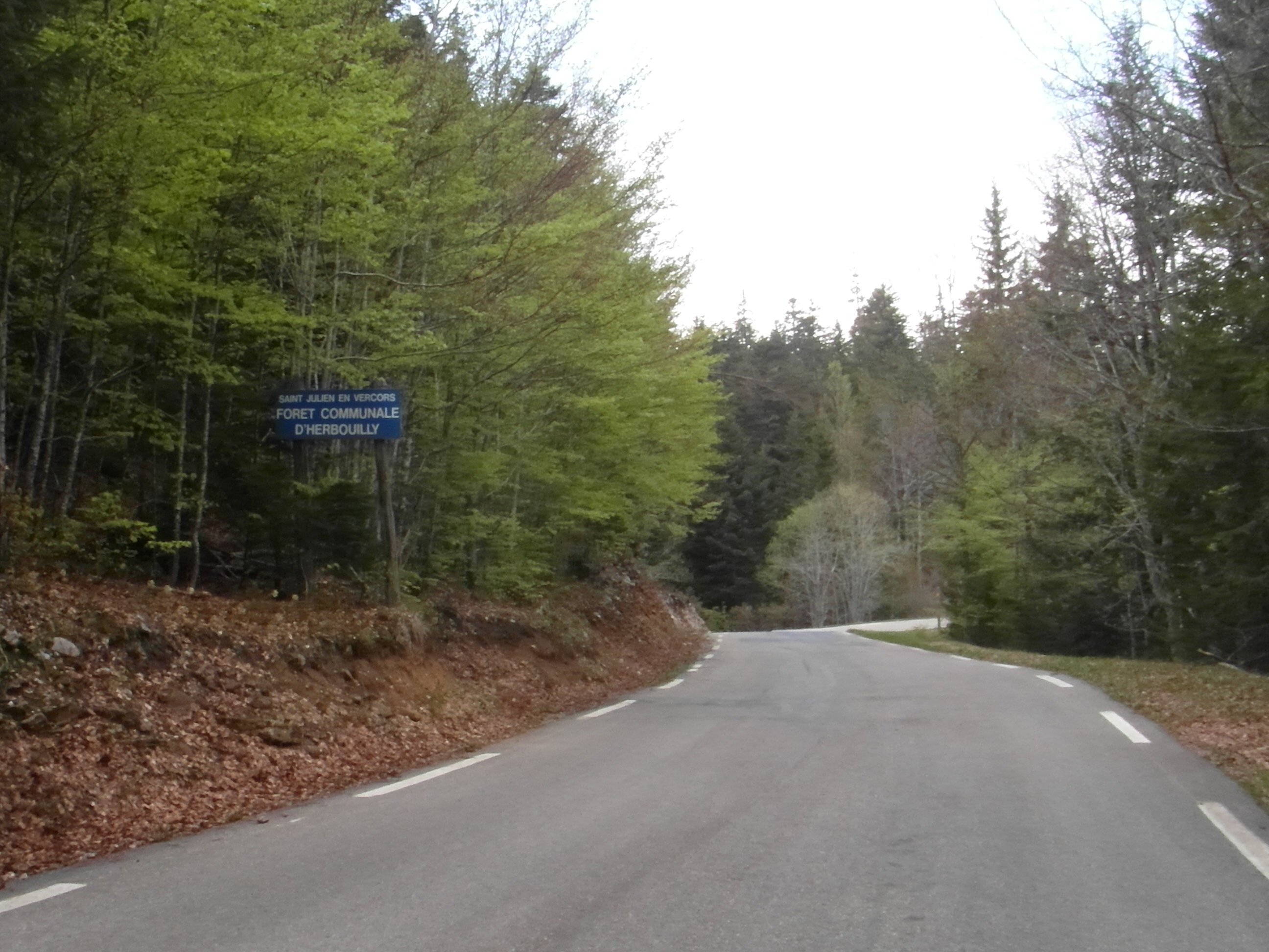 Forêt d'Herbouilly à Saint-Julien-en-Vercors